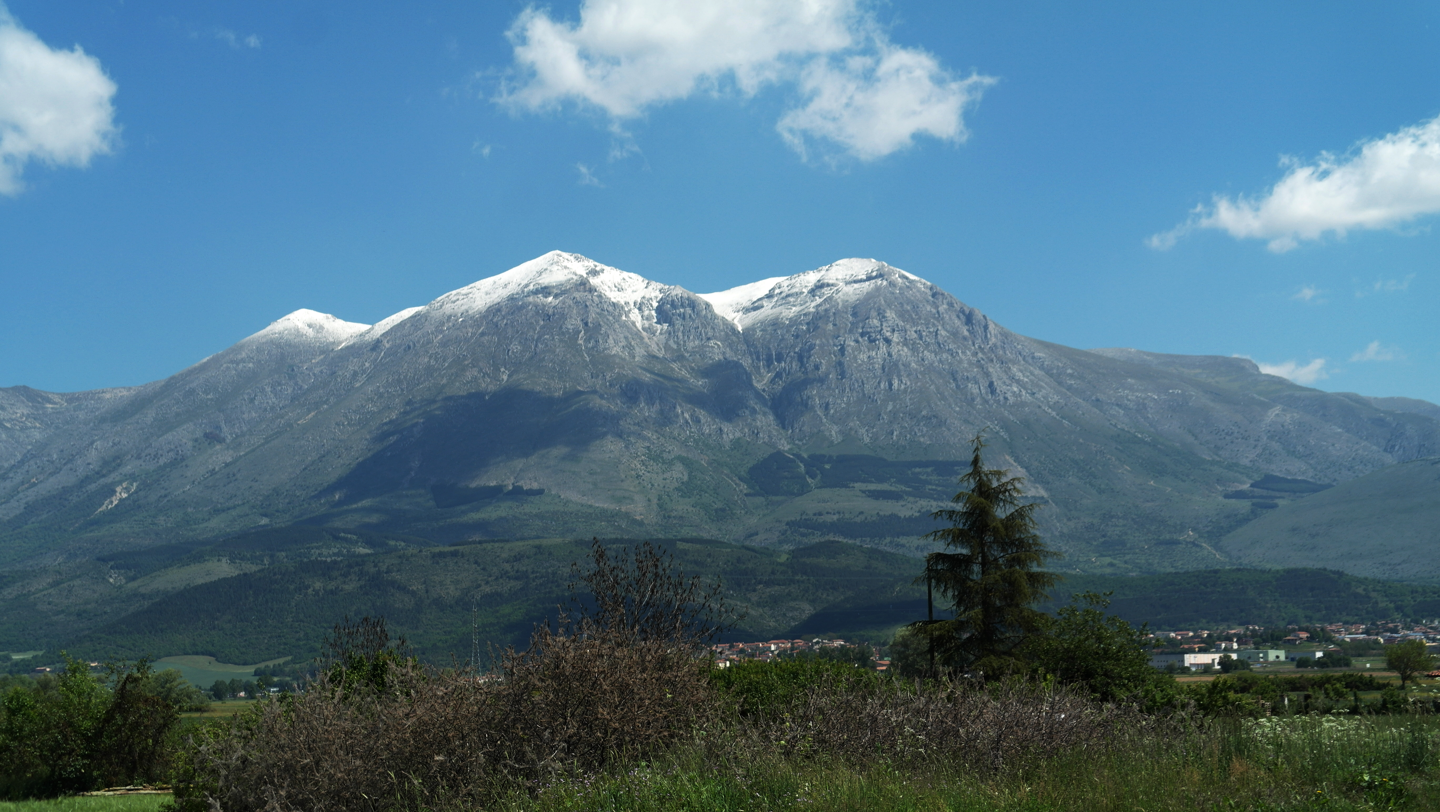 Scurcola Marsicana, Province of L'Aquila, Italy